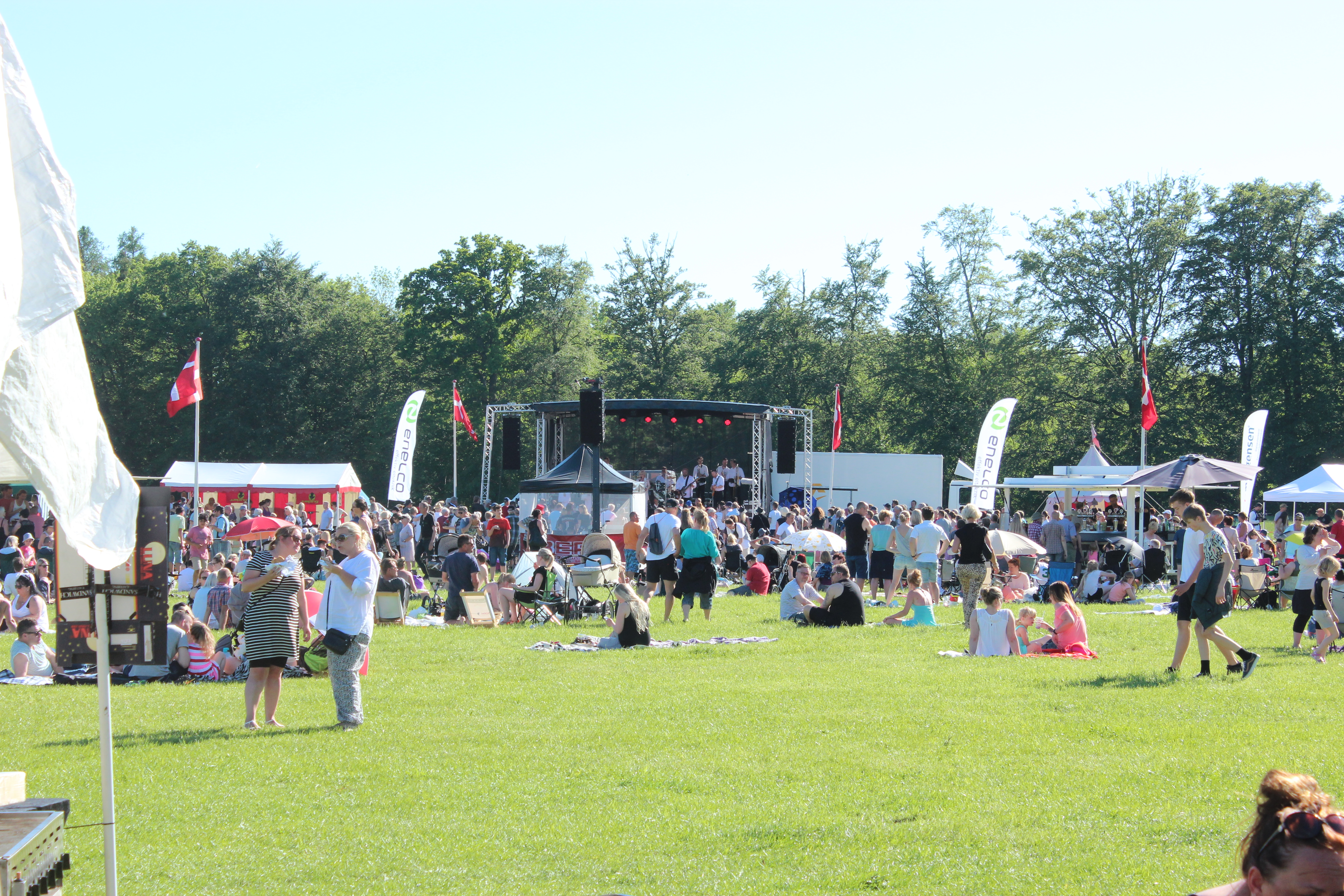 d. 27. maj 2017.